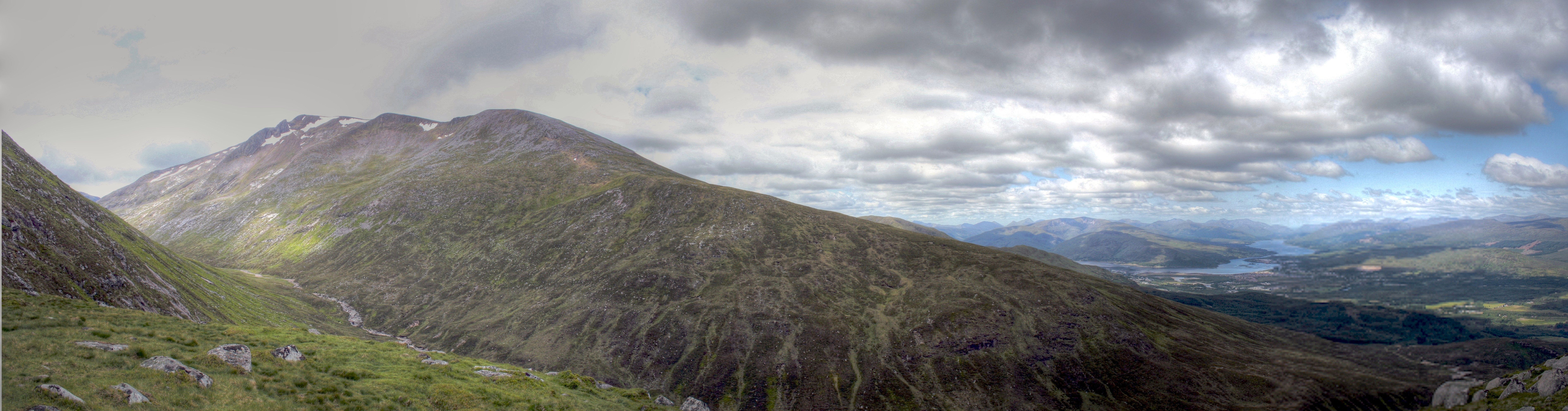 Ben Nevis panorama